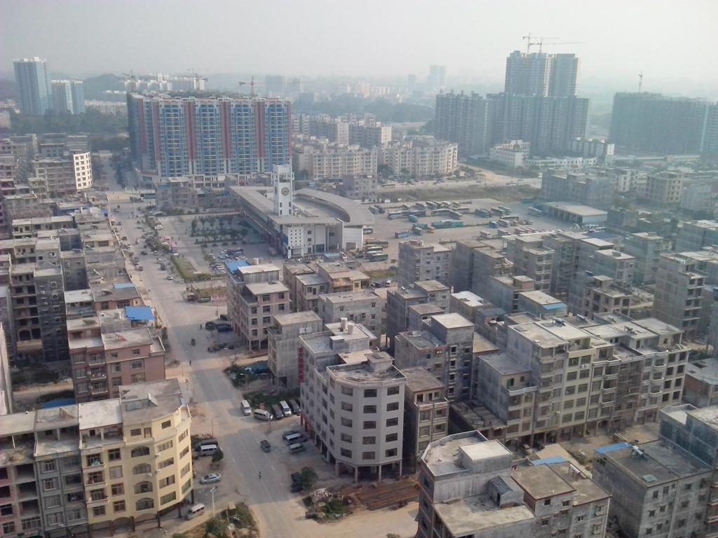 亲水湾小区看防城区